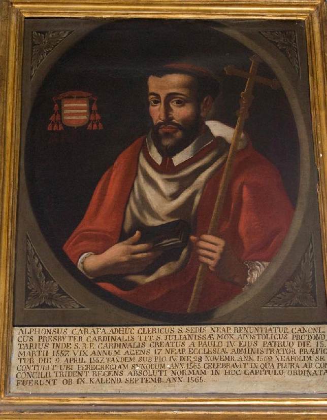 Ritratto del cardinale Alfonso Carafa